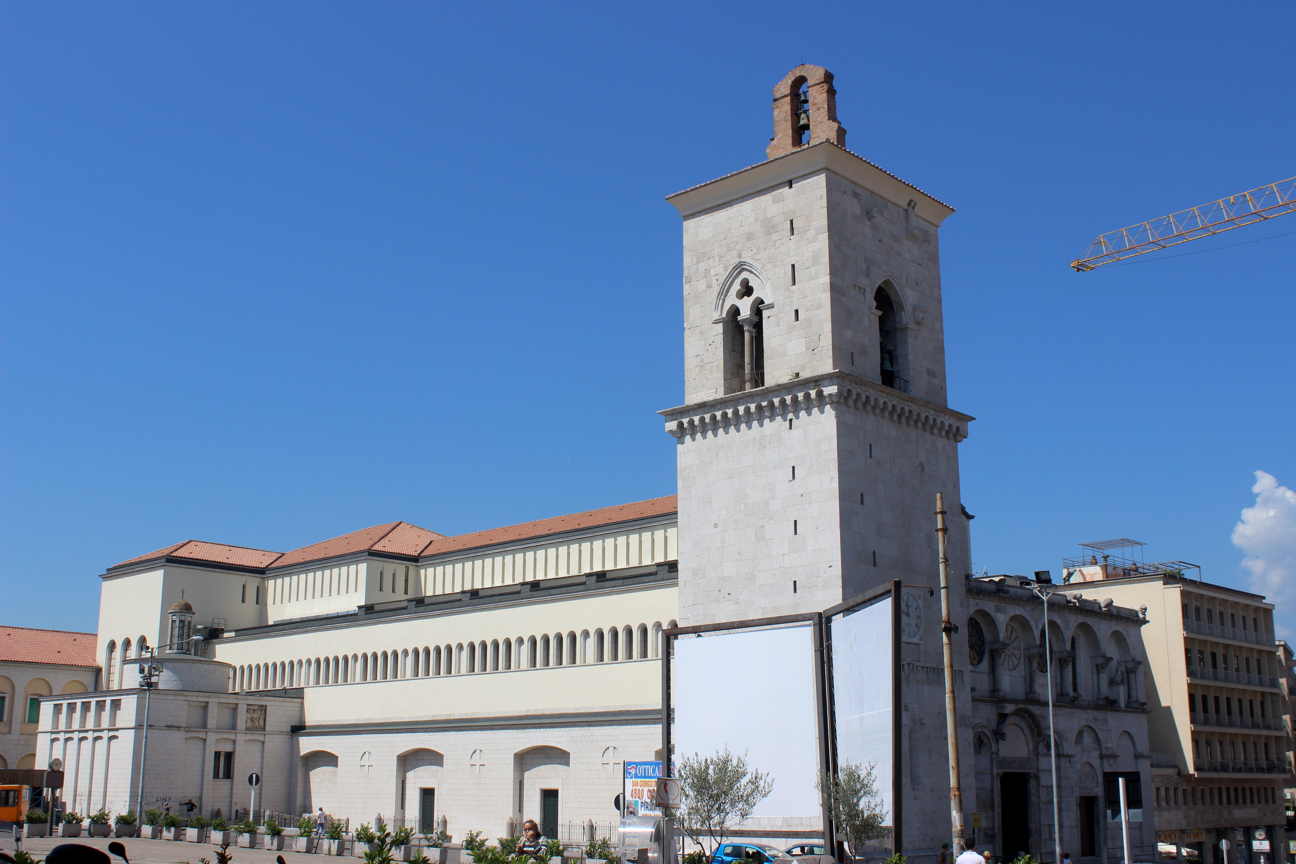 Catedral de Benevento